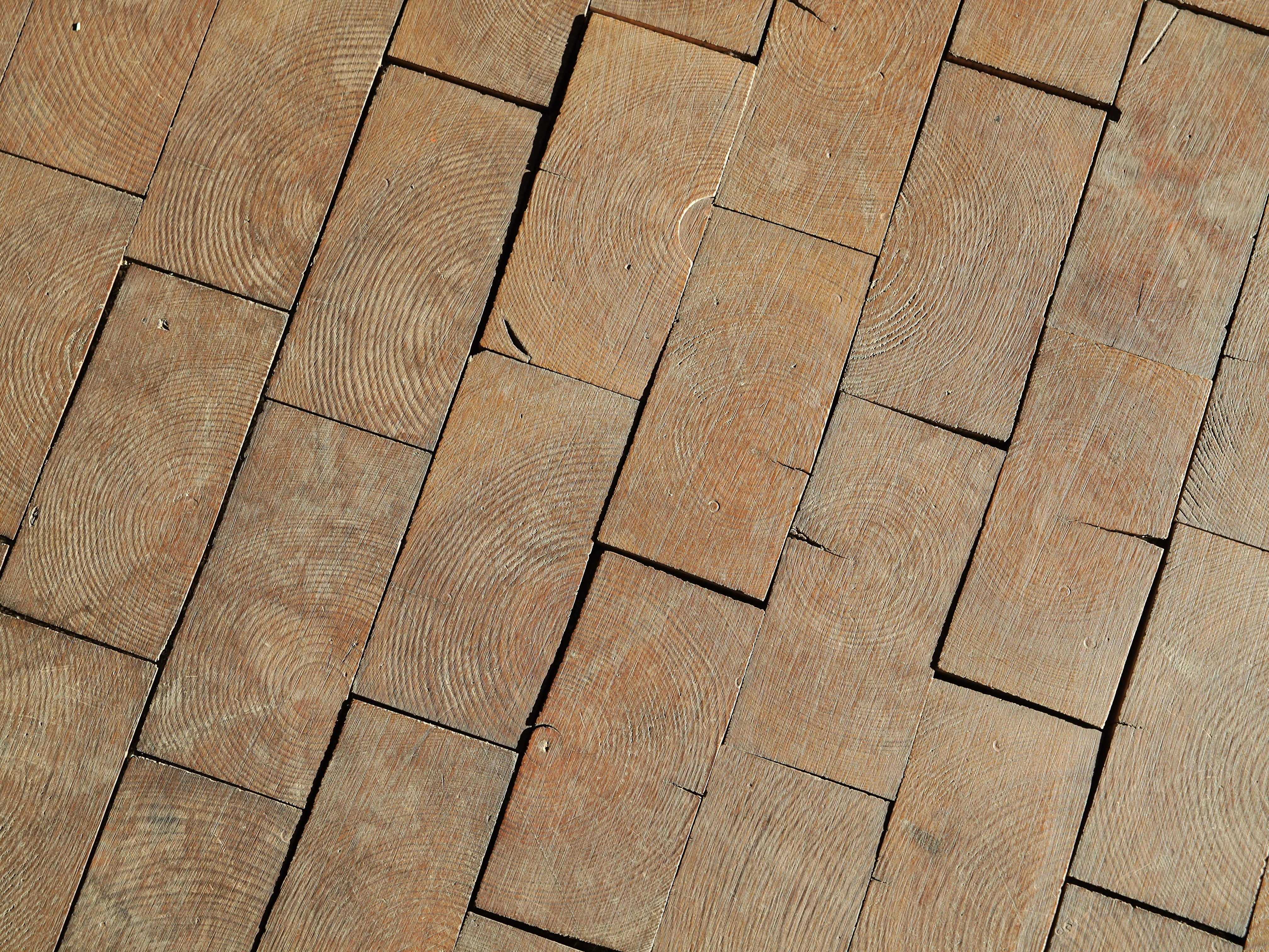 DASA - Hirnholzpflasterung bei schwer belasteten Böden